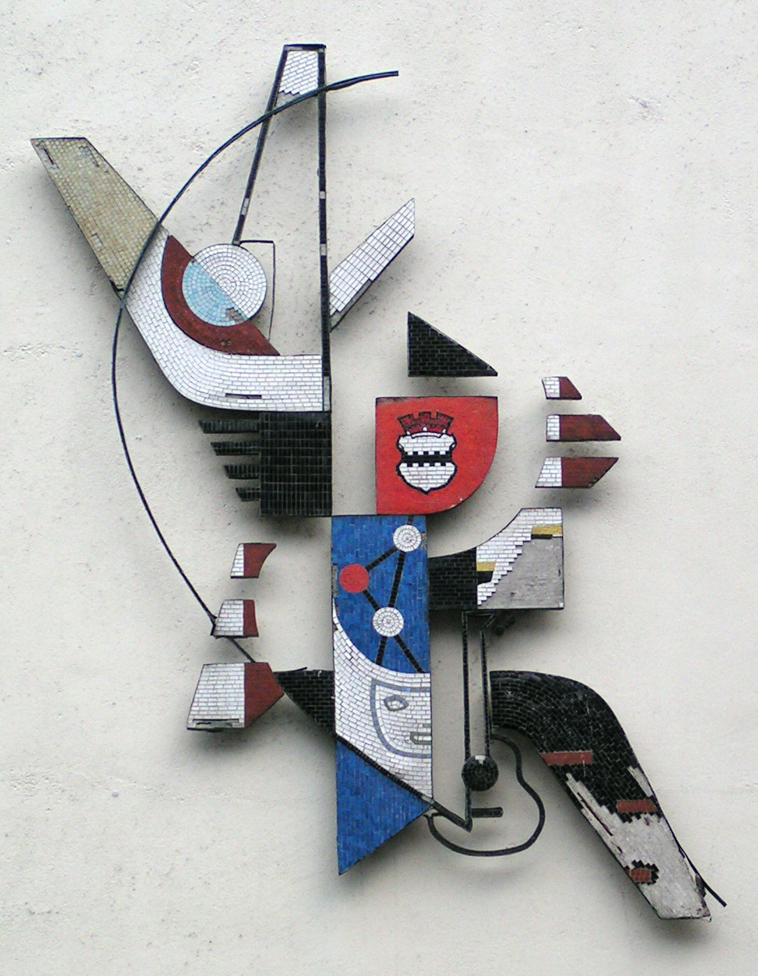 Mosaik an der ehemaligen Stadtbücherei Opladen, enthält u.a. das Opladener Stadtwappen. Das Mosaik von Erwin und Helmut Plönes stellt "den Pendelschlag der geistigen Regsamkeit einer Stadt in Theatermaske, Musikinstrument und wissenschaftlichen Zeichen" dar (Zitat nach Rolf Müller: "Upladhin - Opladen", Selbstverlag der Stadtverwaltung Opladen, 1974). Inzwischen (Dezember 2007) wurde das Mosaik entfernt.